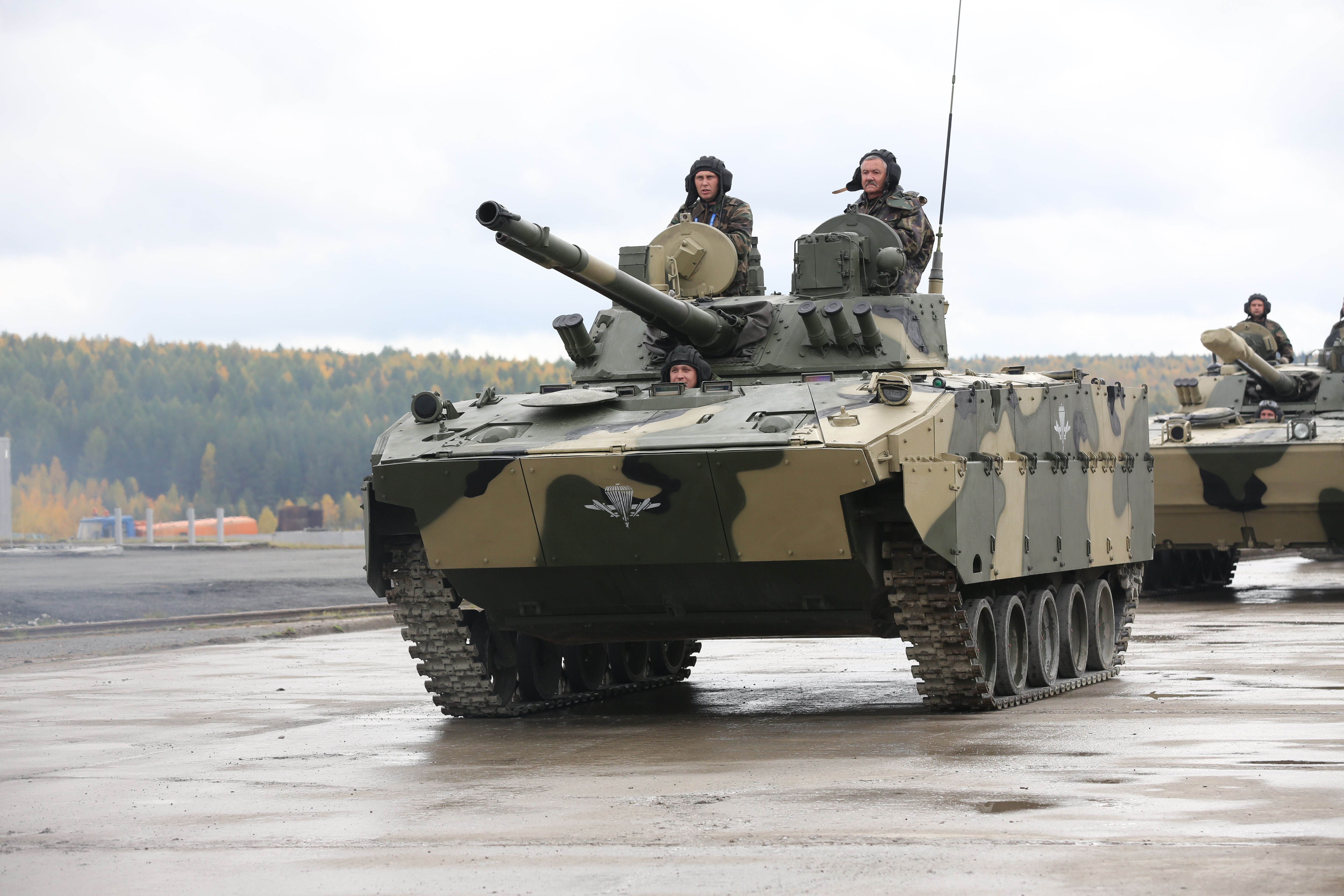 БМД-4М с усиленной защитой (BMD-4M with additional protection)